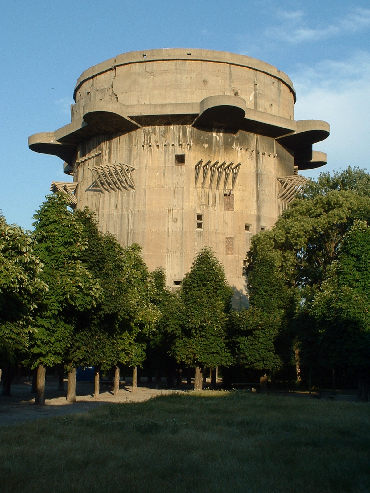 Flakturm in Augarten, Vienna